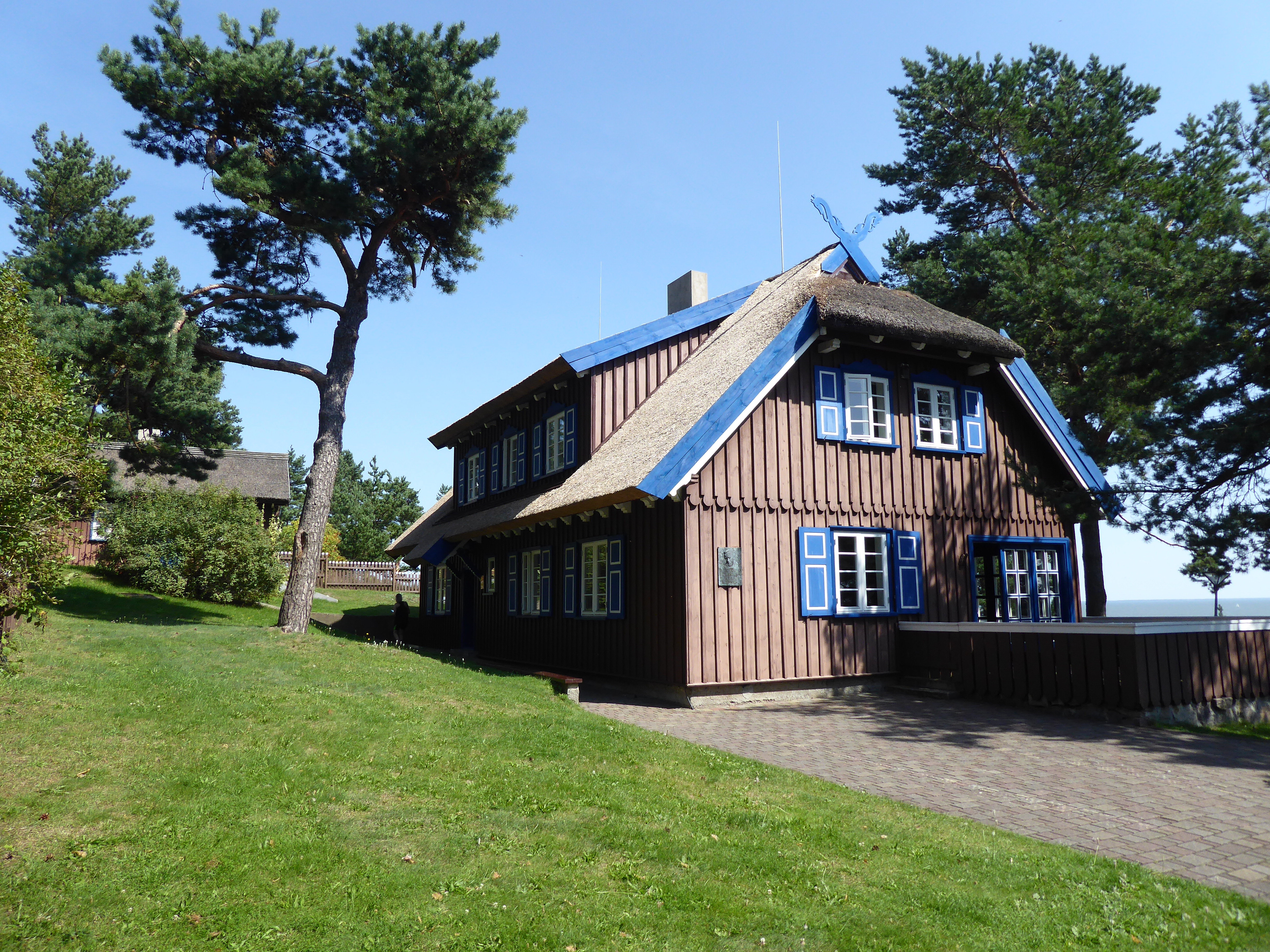 Nida Thomas-Mann-Gedenkstätte